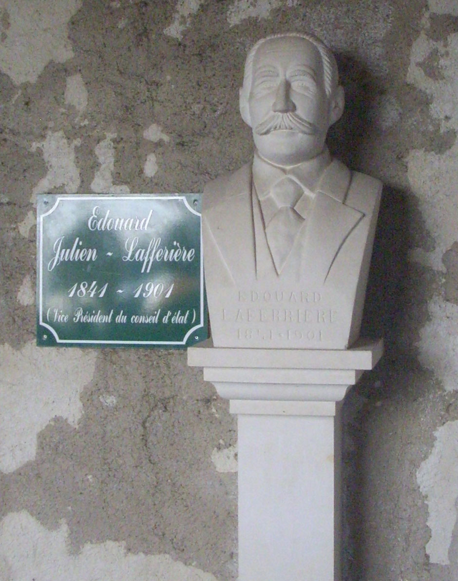 Cloître des Carmes, Jonzac, France Buste d'Edouard Laferrière